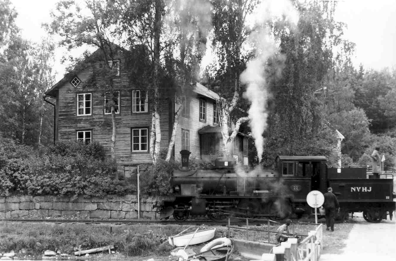 Hjortöström Hjortöström, ett samhälle 2-3 kilometer söder om Virserum i Småland. Bilden är tagen sommaren 1989, då ångloket på Smalspåret fyller på vatten från dammen i byn. Kortet är taget av en av dåvarande delägarna (Harri Blomberg) till det stora trähuset i bakgrunden.